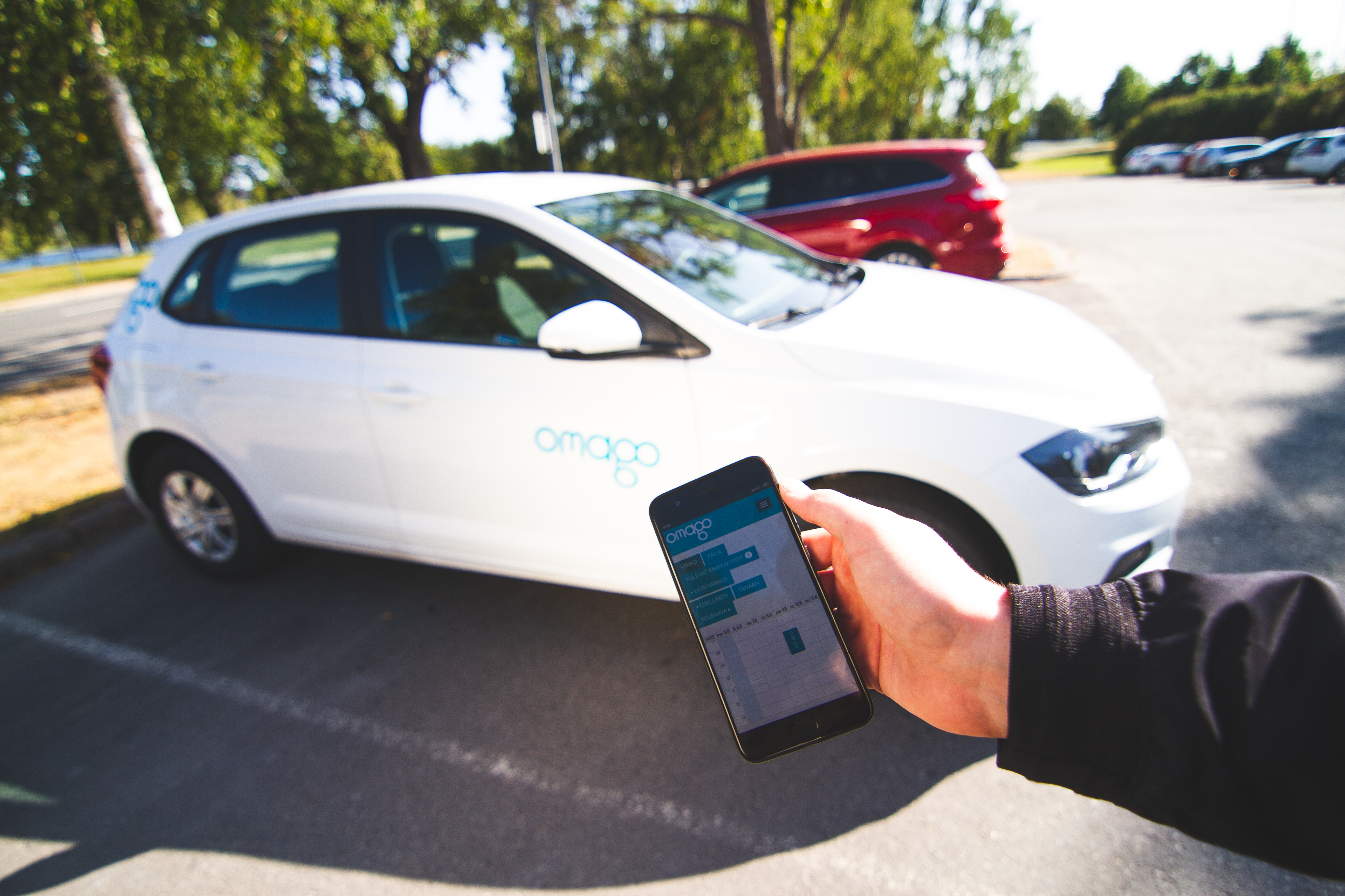 Omagon ytheiskäyttöauto (Omagon utility vehicle)